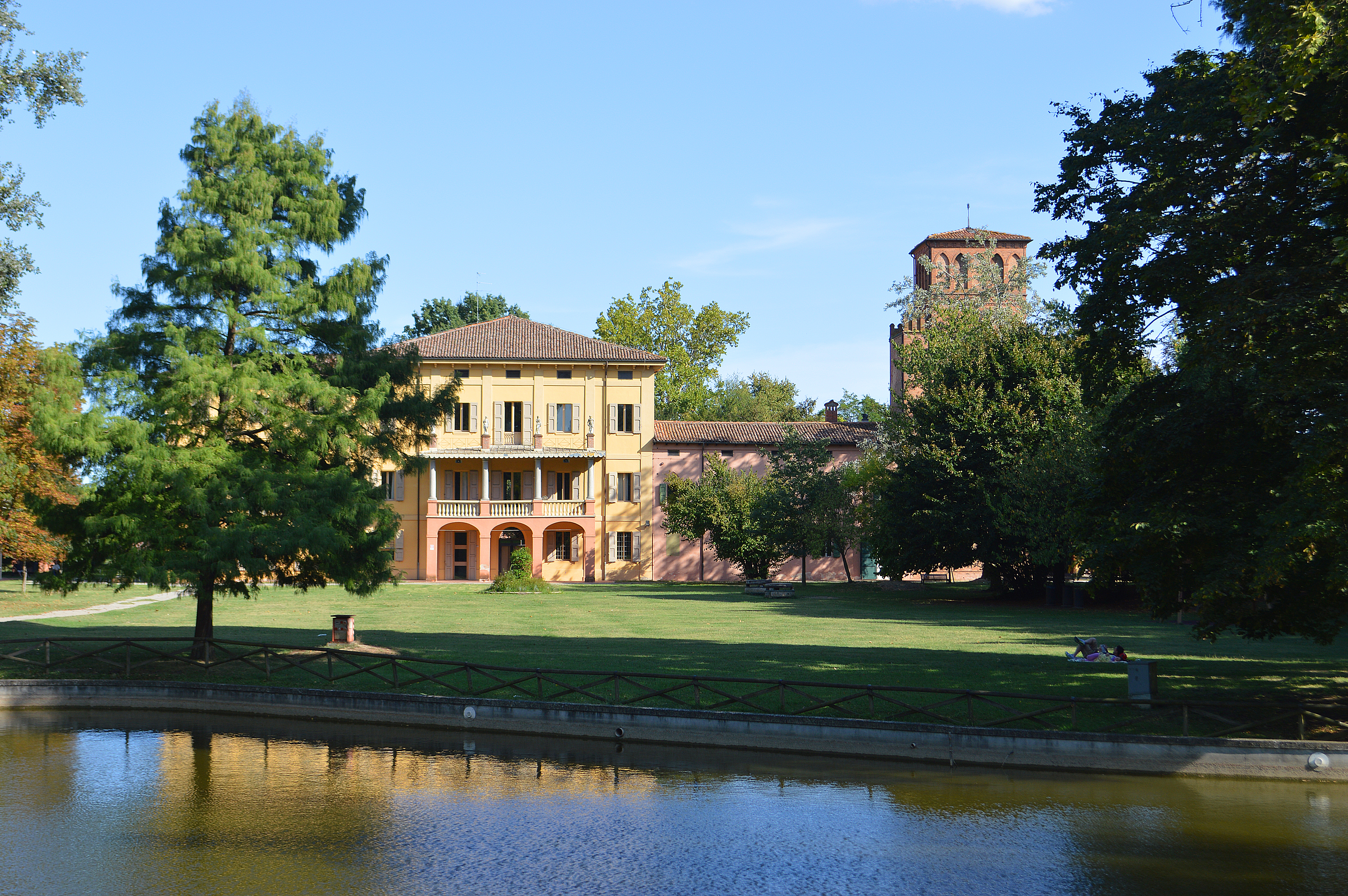 Istituzione villa Smeraldi, Museo della civiltà contadina, San Marino di Bentivoglio, Città Metropolitana di Bologna This is a photo of a monument which is part of cultural heritage of Italy.